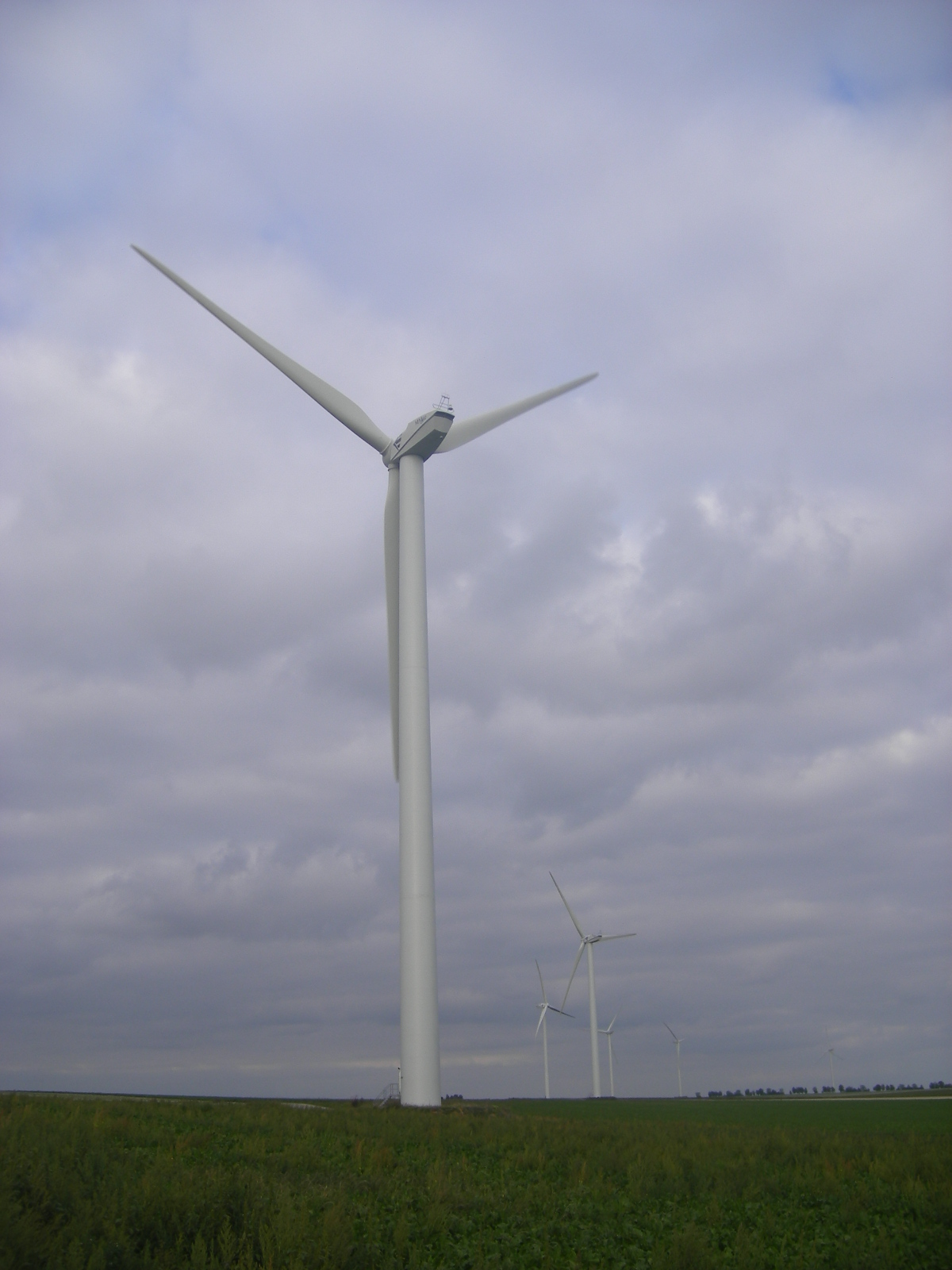 Bonne Voisine wind farm (commune Champfleury, Aube, France)